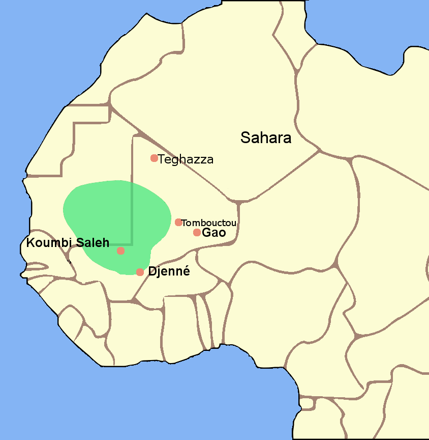 Carte de l'empire du Ghana en français